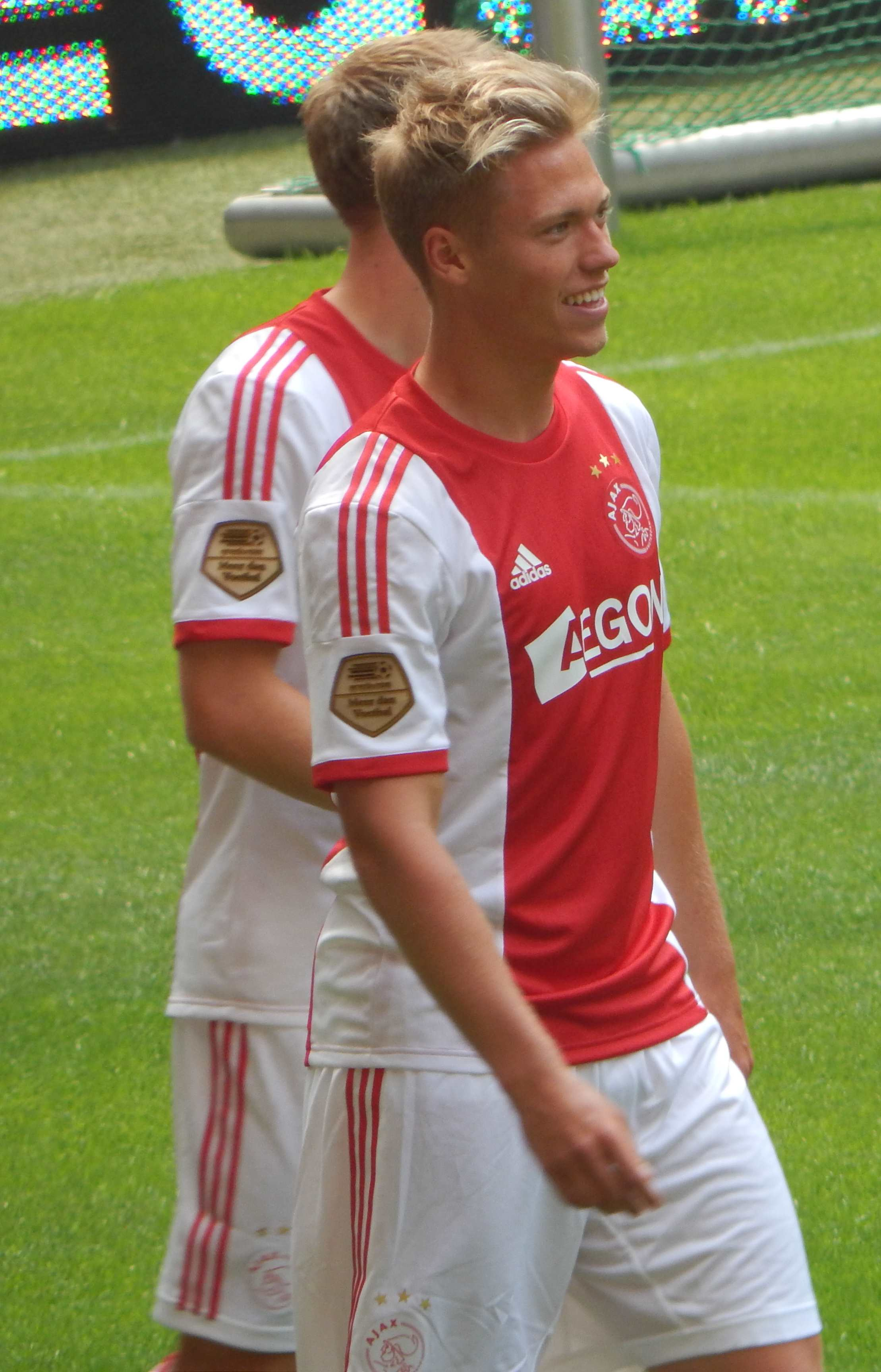 Viktor Fischer, uitkomend voor AFC Ajax